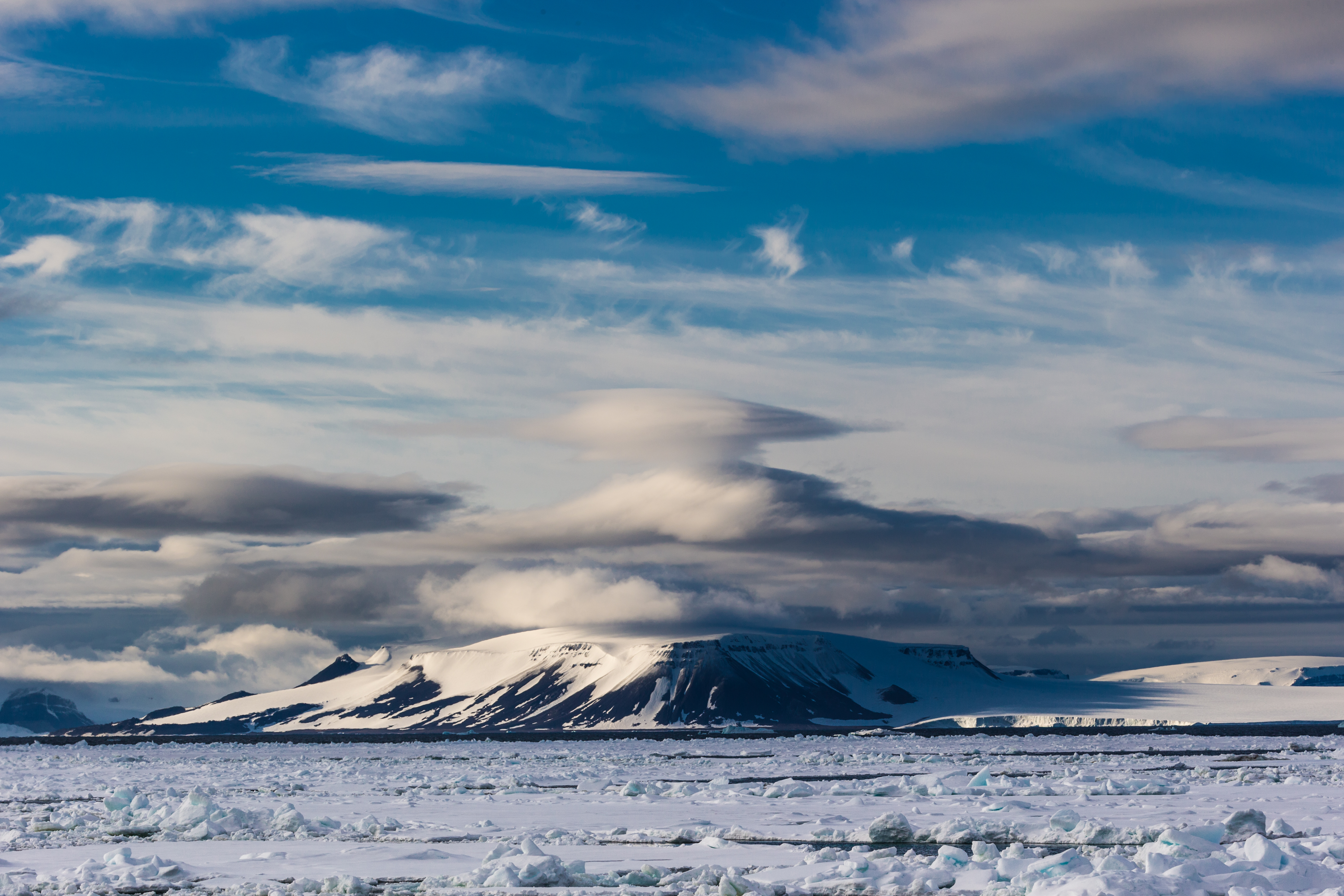 Комплексный заказник Земля Франца-Иосифа, Приморский район This image is related to the protected area of Russia number 2930163